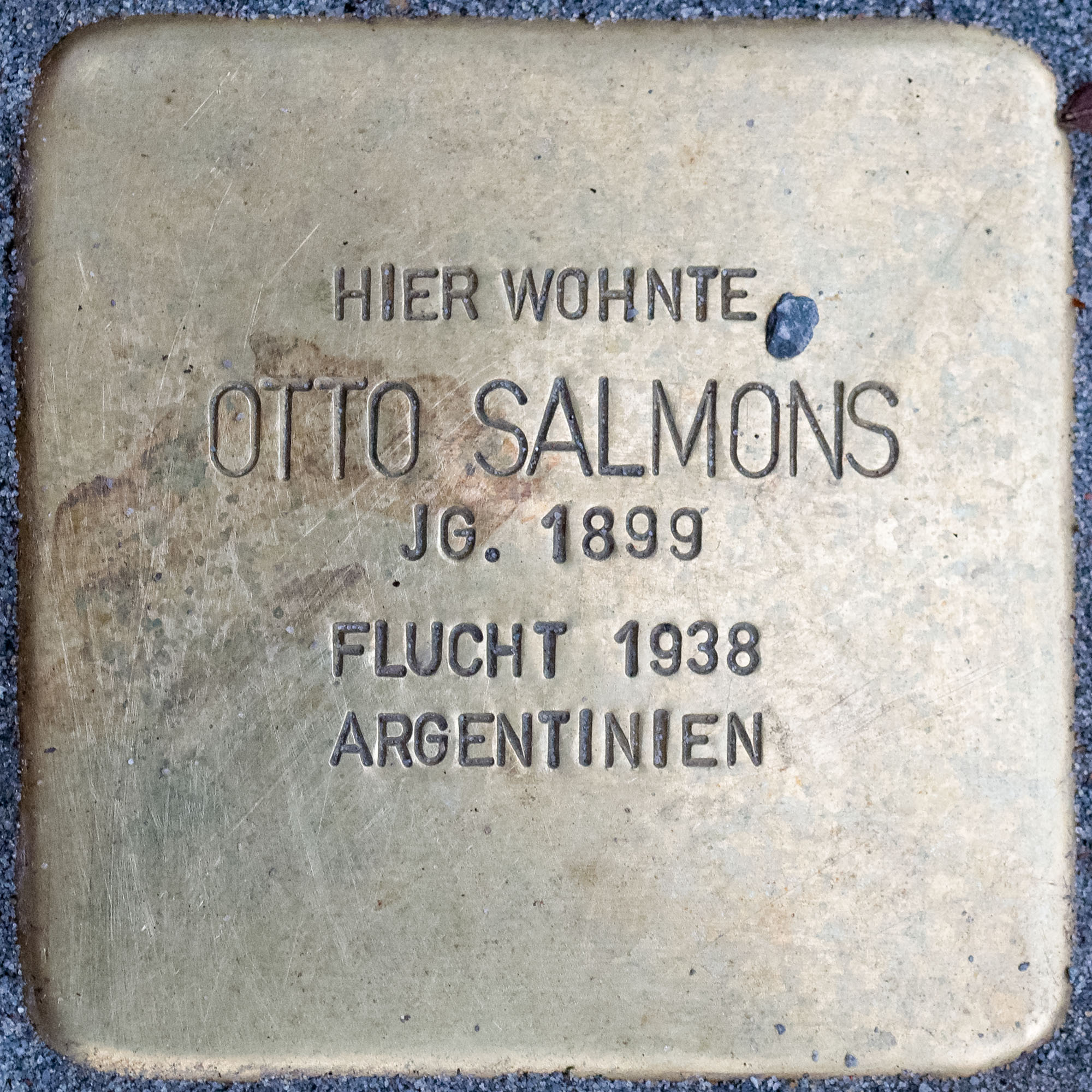 Stolpersteine Willich: Salmons, Otto